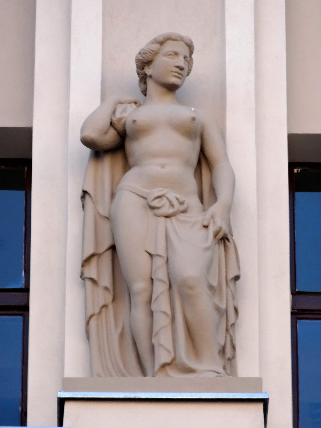 Dom Towarowy Jedynak, ul. Gdańska 15 w Bydgoszczy (zbud. 1910)